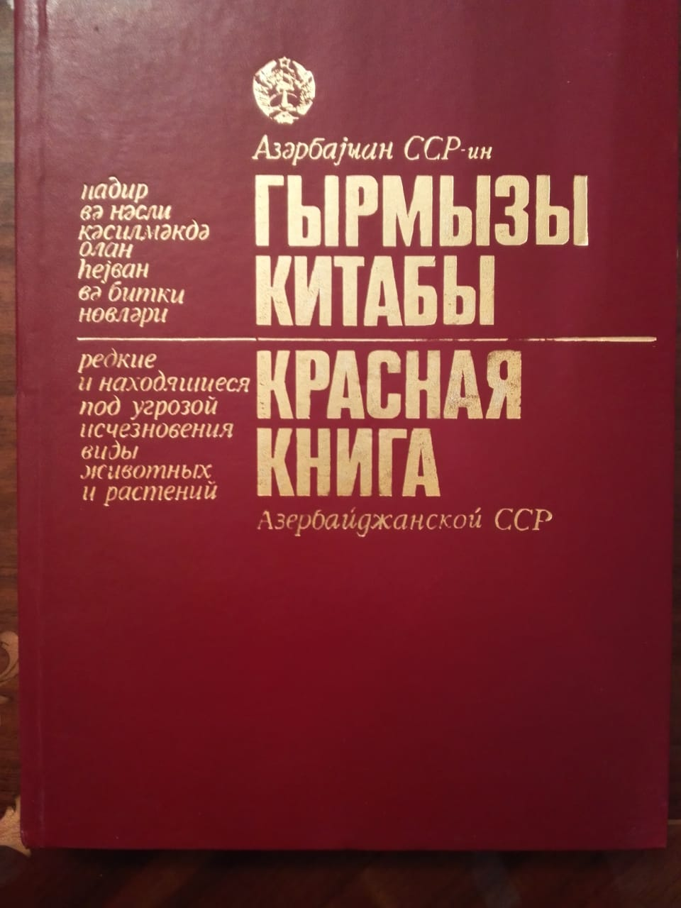 foto